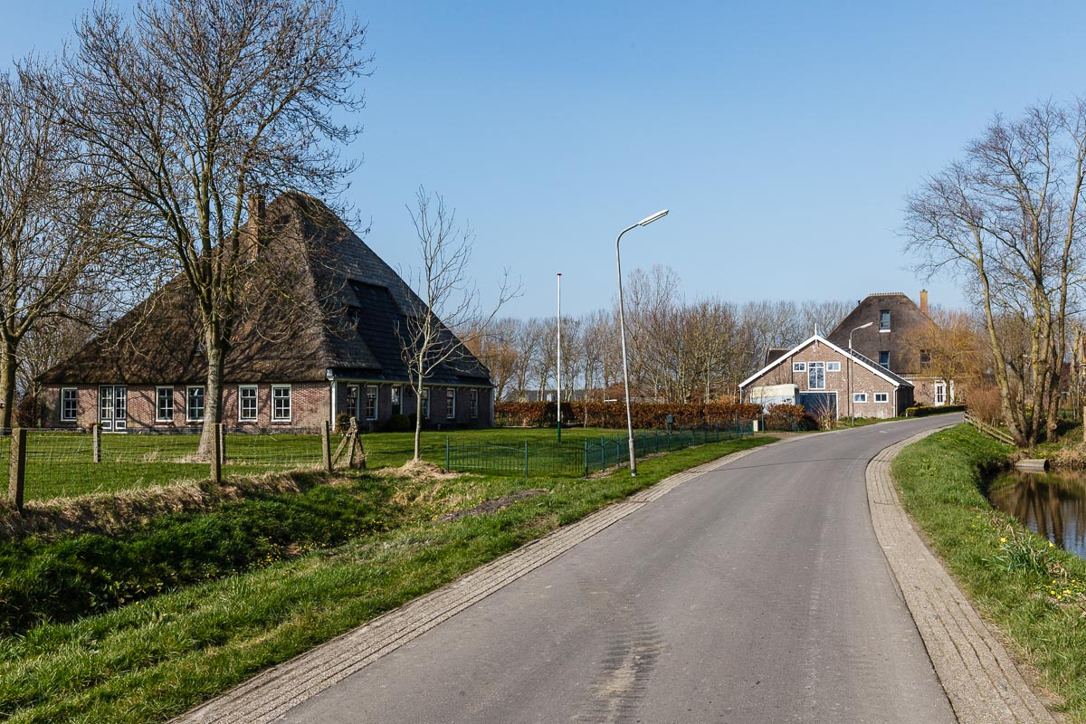 Surmerhuizerweg, Eenigenburg, gemeente Schagen, Noord Holland, Nederland